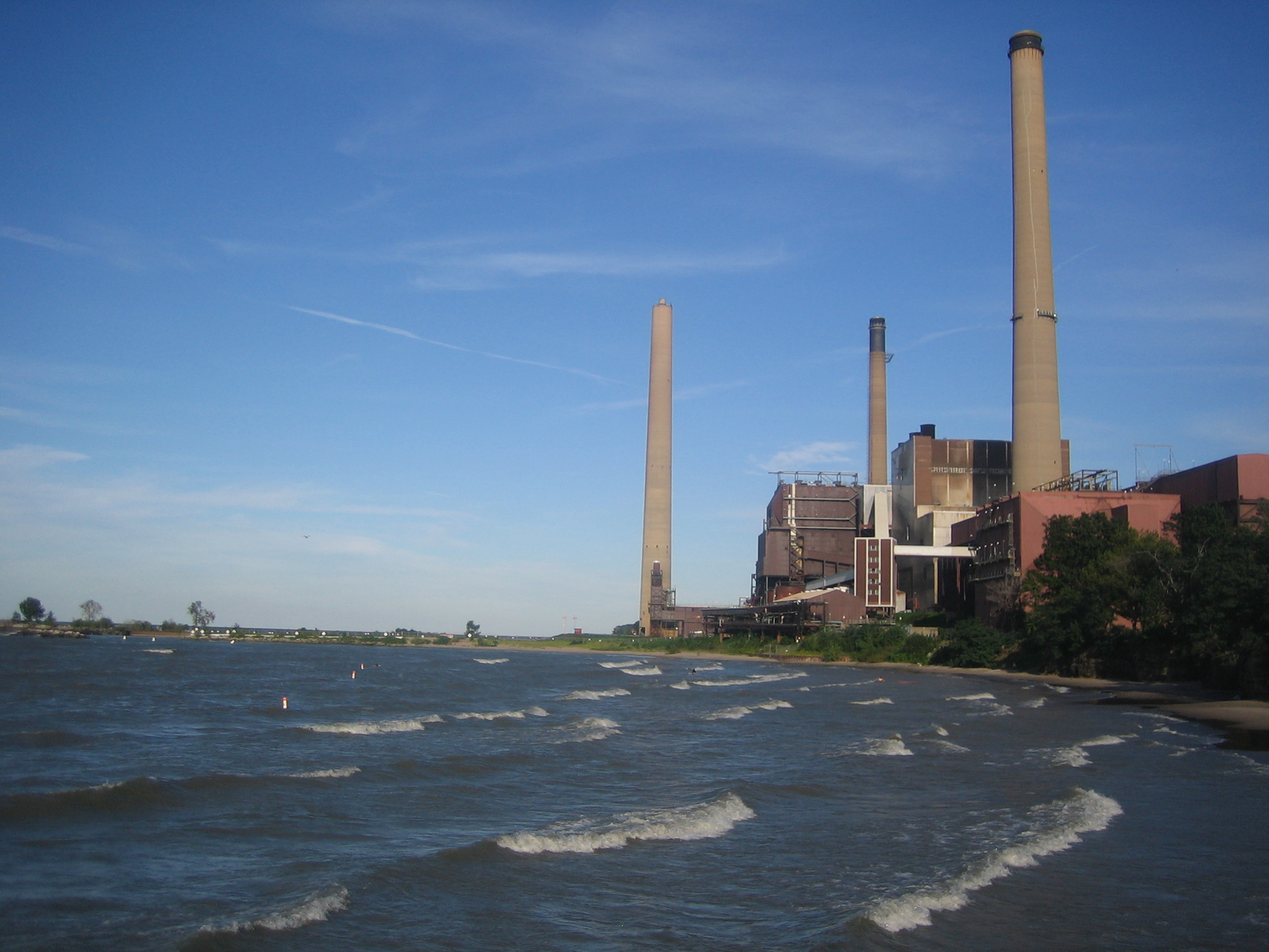 Power Plant on Lake Erie